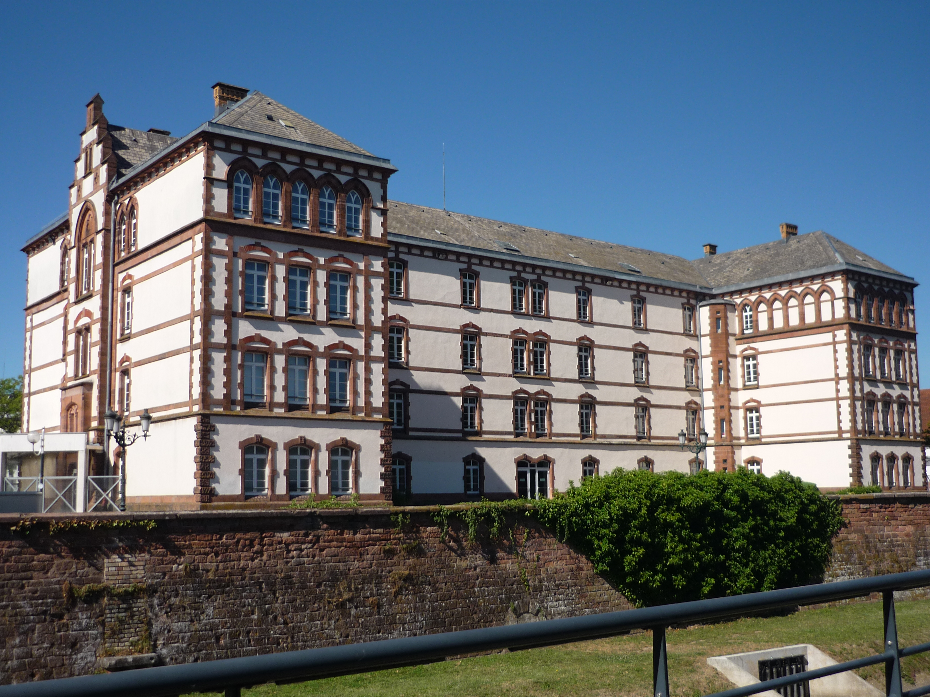 Lycée professionnel Siegfried de Haguenau (ancienne caserne) vu du Quai des Pêcheurs